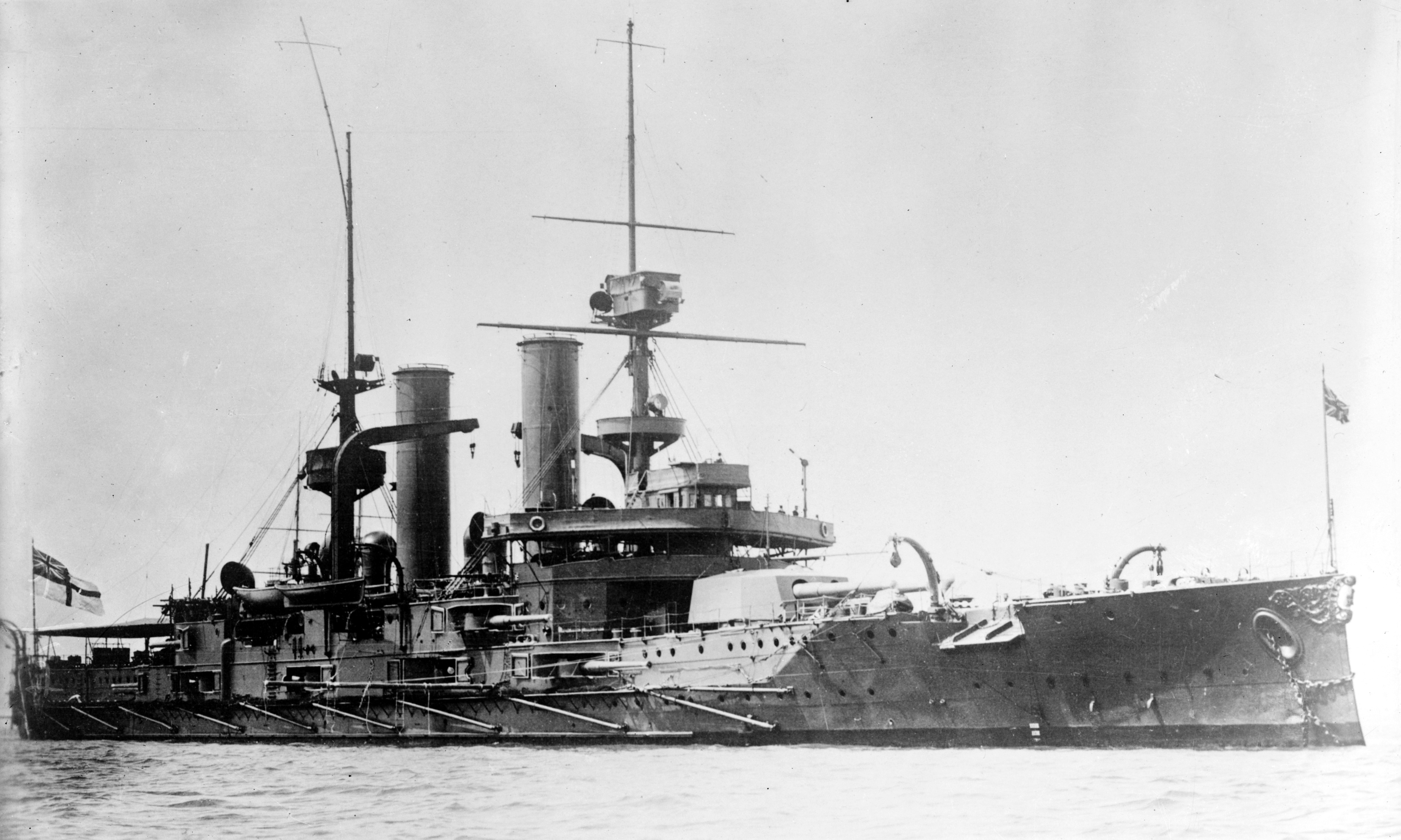 HMS Swiftsure